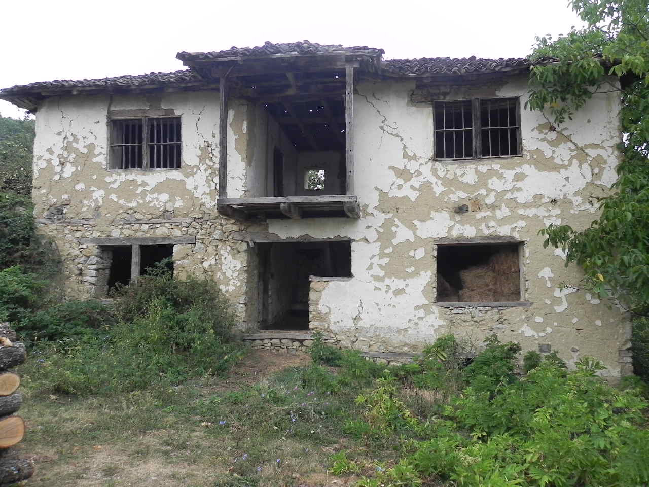 The house of Ilmi Rrustemi - Kokaj